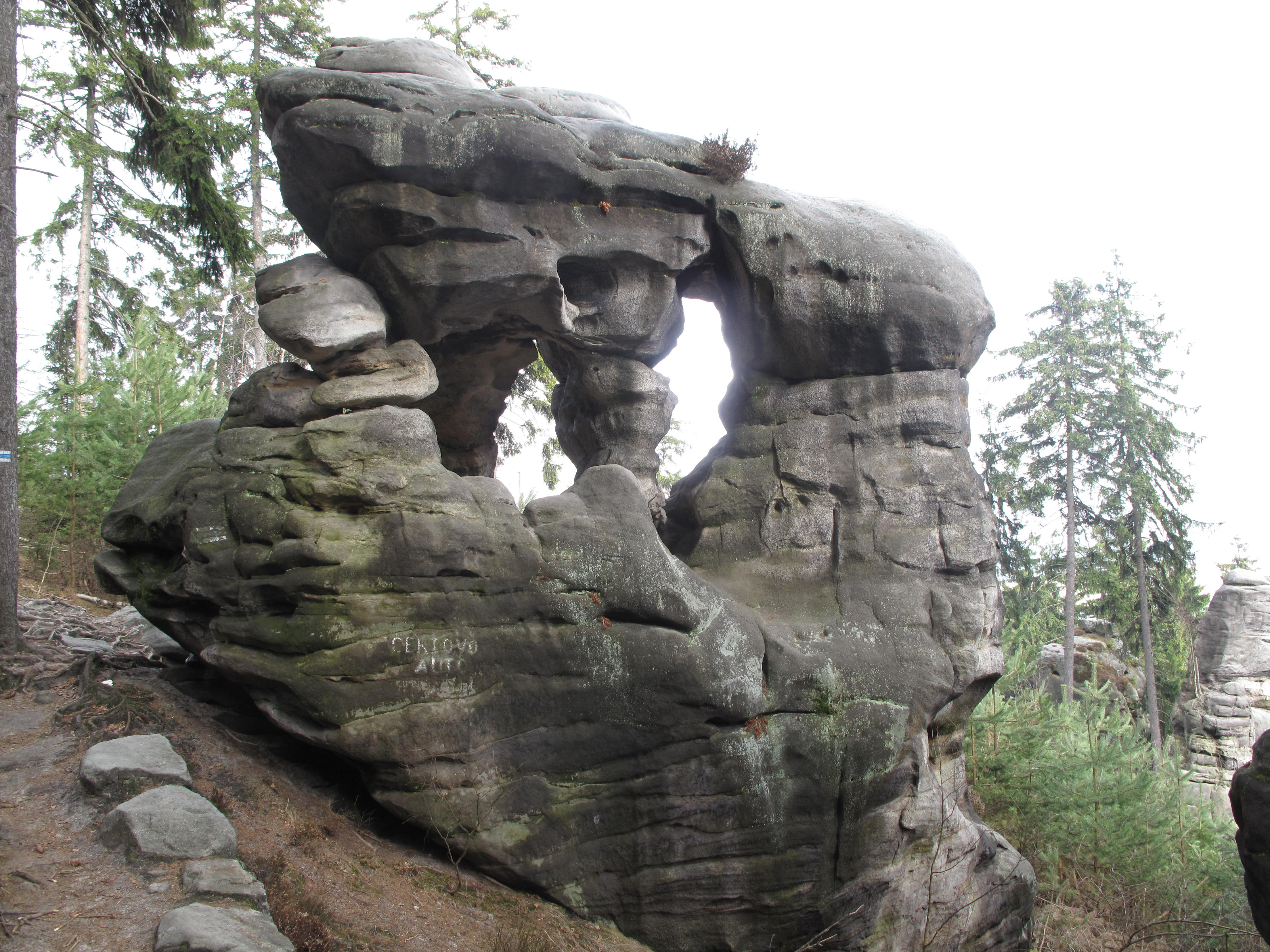 Ostaš